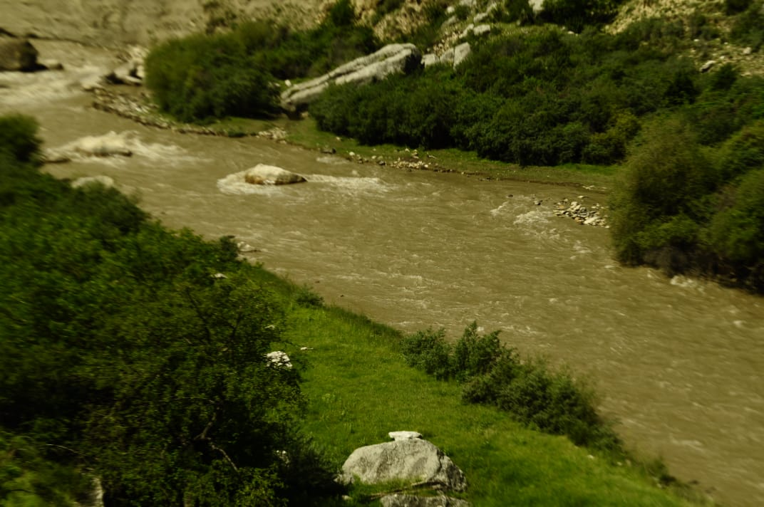 Казикумухское Койсу в Левашинском районе Дагестана